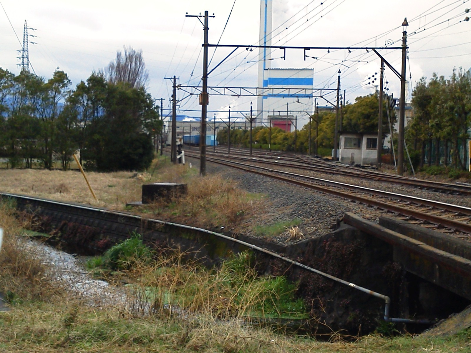 比奈駅のヤード線。かつては機回し線もあったが、現在は撤去されている。